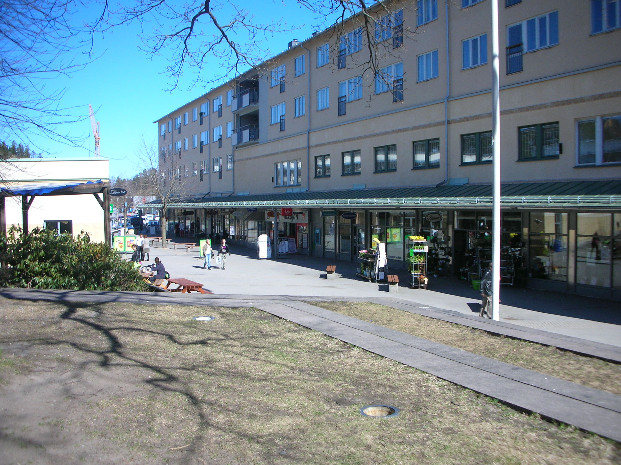 Bild på Tullinge Torg/Centrum